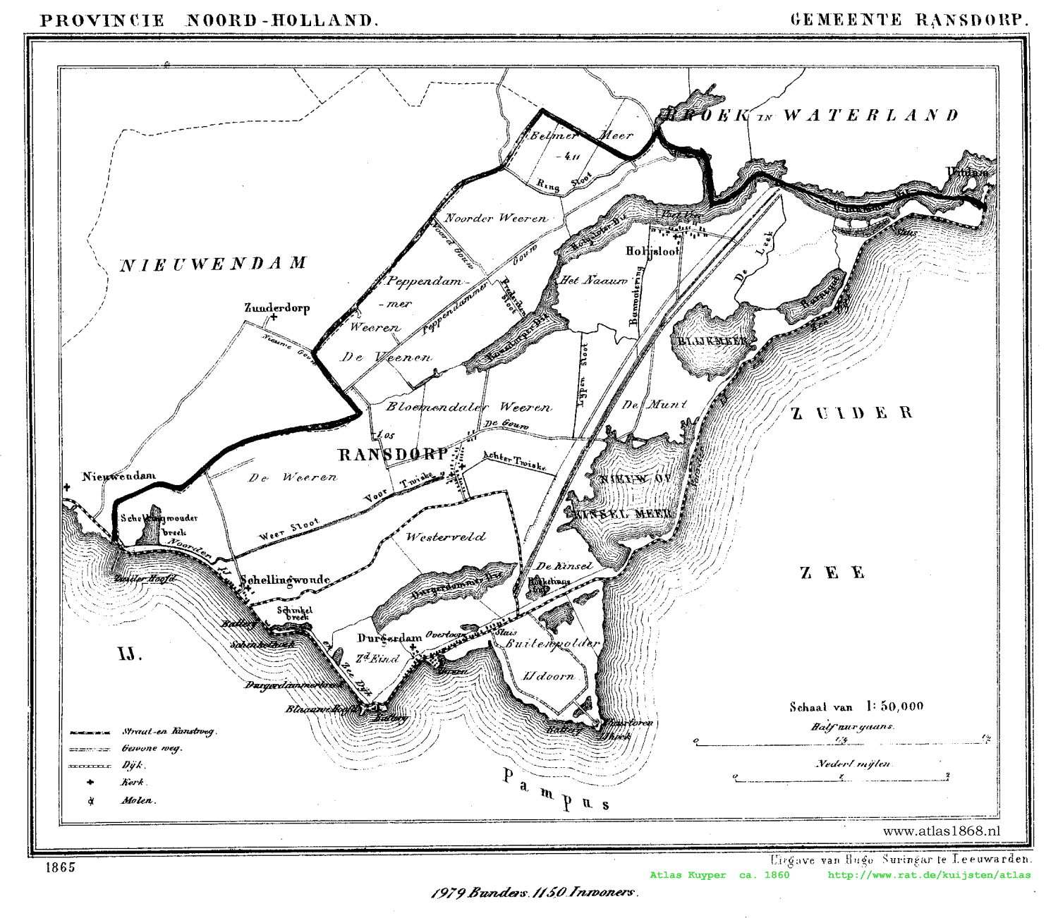 Kaart van Ransdorp uit Gemeente Atlas van Nederland, J. Kuyper 1865-1870, Uitgave Hugo Suringar Leeuwarden.